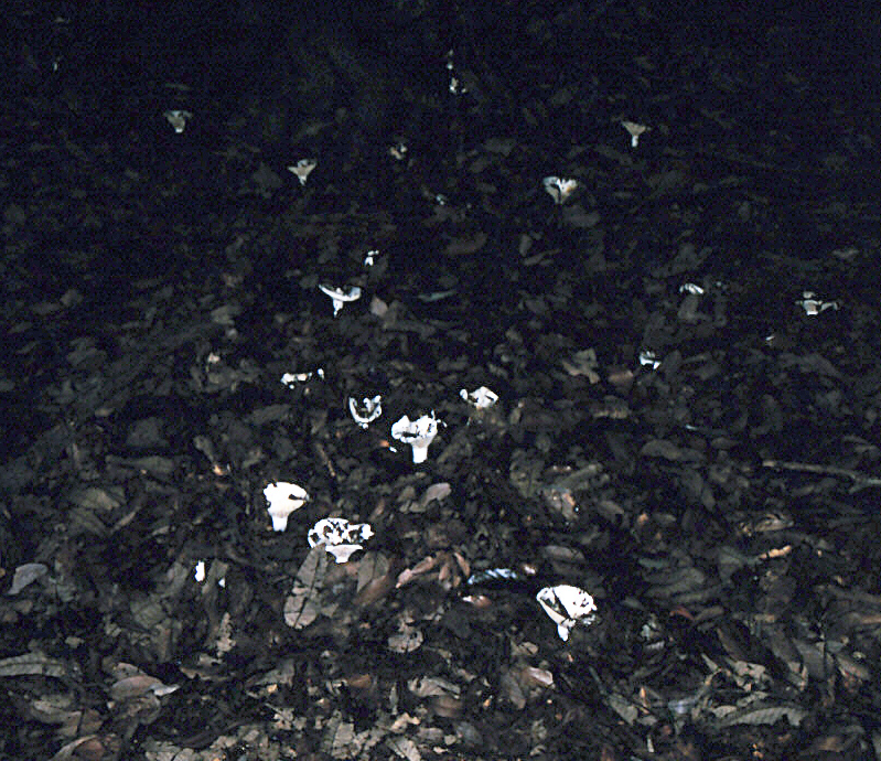 Russula japonica 2000-0708 Isé-ji (Japon) シロハツモドキ 高槻市 伊勢寺